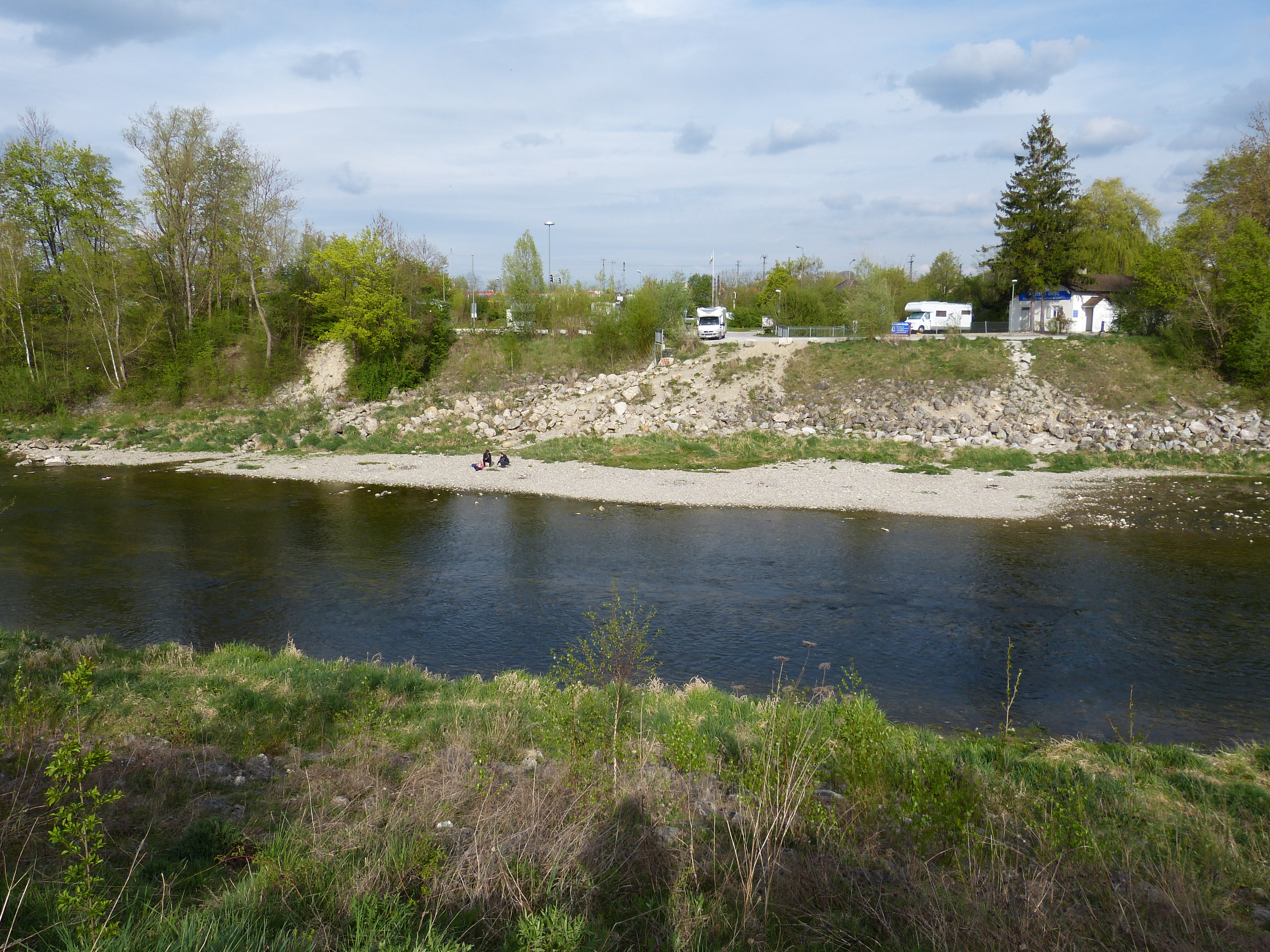 Die Wertach in Augsburg an der ehemaligen Goggelesbrücke. Das Goggeleswehr an dieser Stelle und die mit einem Pavillon überdachte Fußgängerbrücke wurden 2005 bei einem Hochwasser zerstört. Nur der Pavillon konnte gerettet werden und steht heute im Augsburger Zoo. An der Ostseite der ehemaligen Brücke ist heute ein Wohnmobilstellplatz.